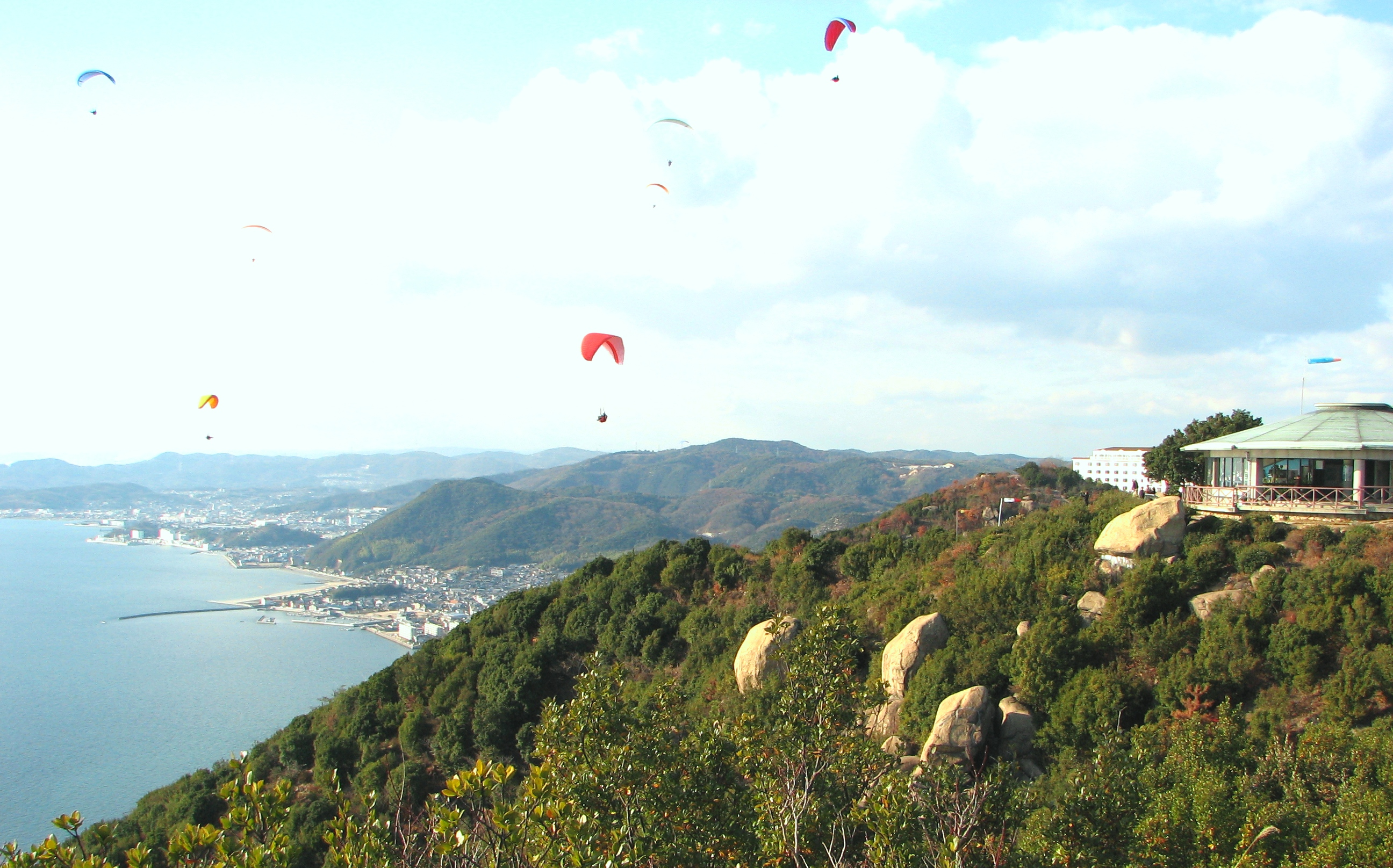 玉野市 王子ヶ岳 ❀ 心ややおちつけば遠山霞みかな（種田山頭火）